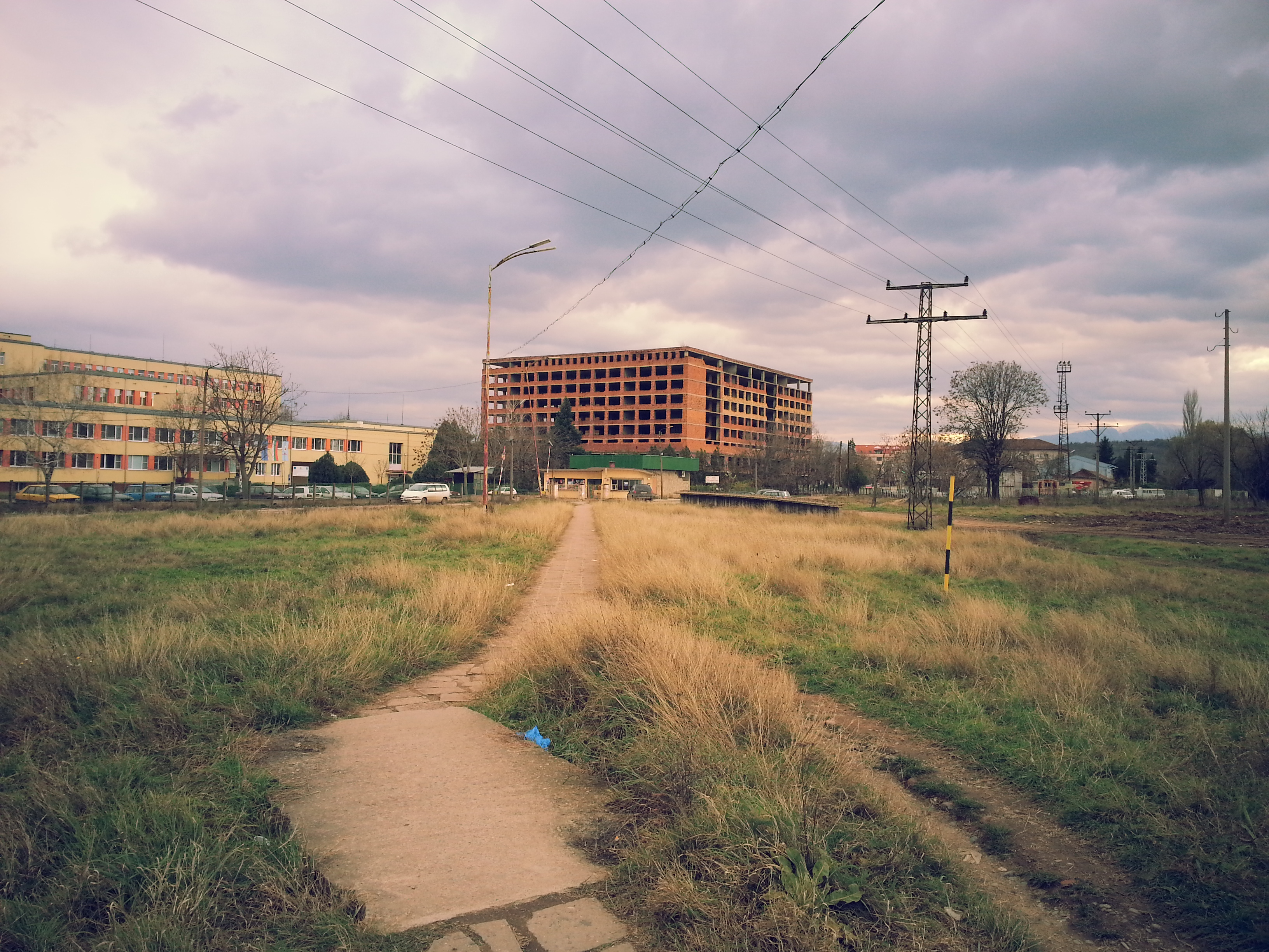 Болницата в Монтана